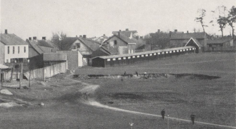 Reperbanen som lå på Skarmyra i Moss.